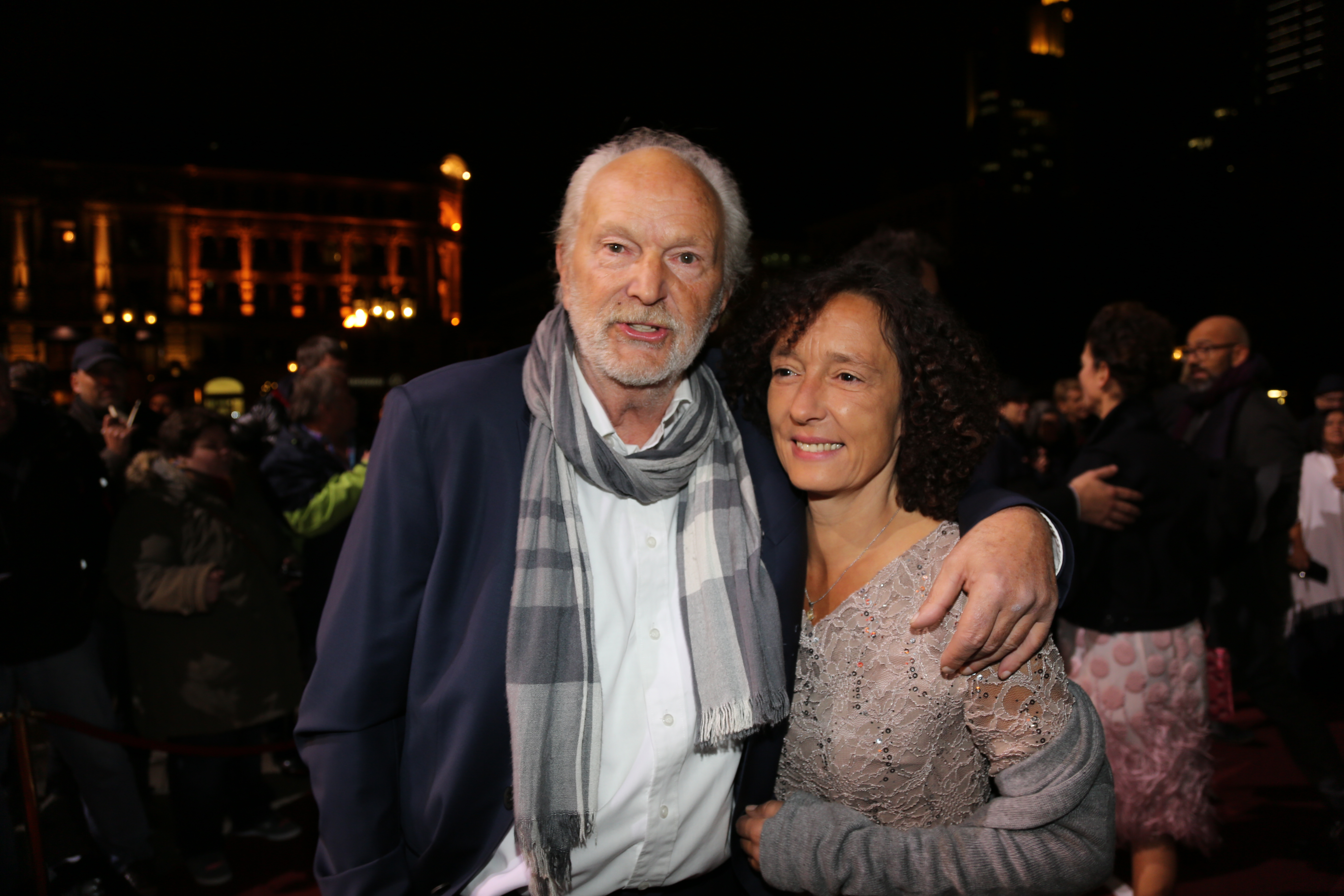 Michael Gwisdek| und Ehefrau Gabriela beim Hessischen Film- und Kinopreis 2015